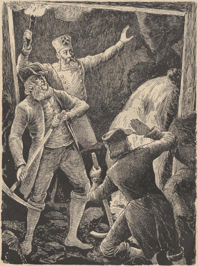 Beiträge zur Sächs. Volks- und Heimatkunde. Mit Zeichnungen von Professor O. Seyffert und Maler F. Rowland.